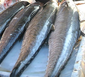 土魠